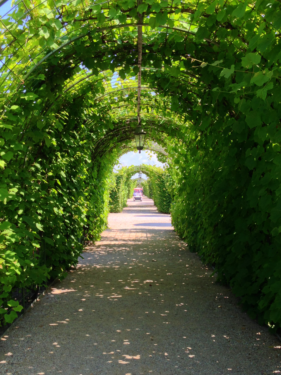 June 2013. Beautiful Latvia